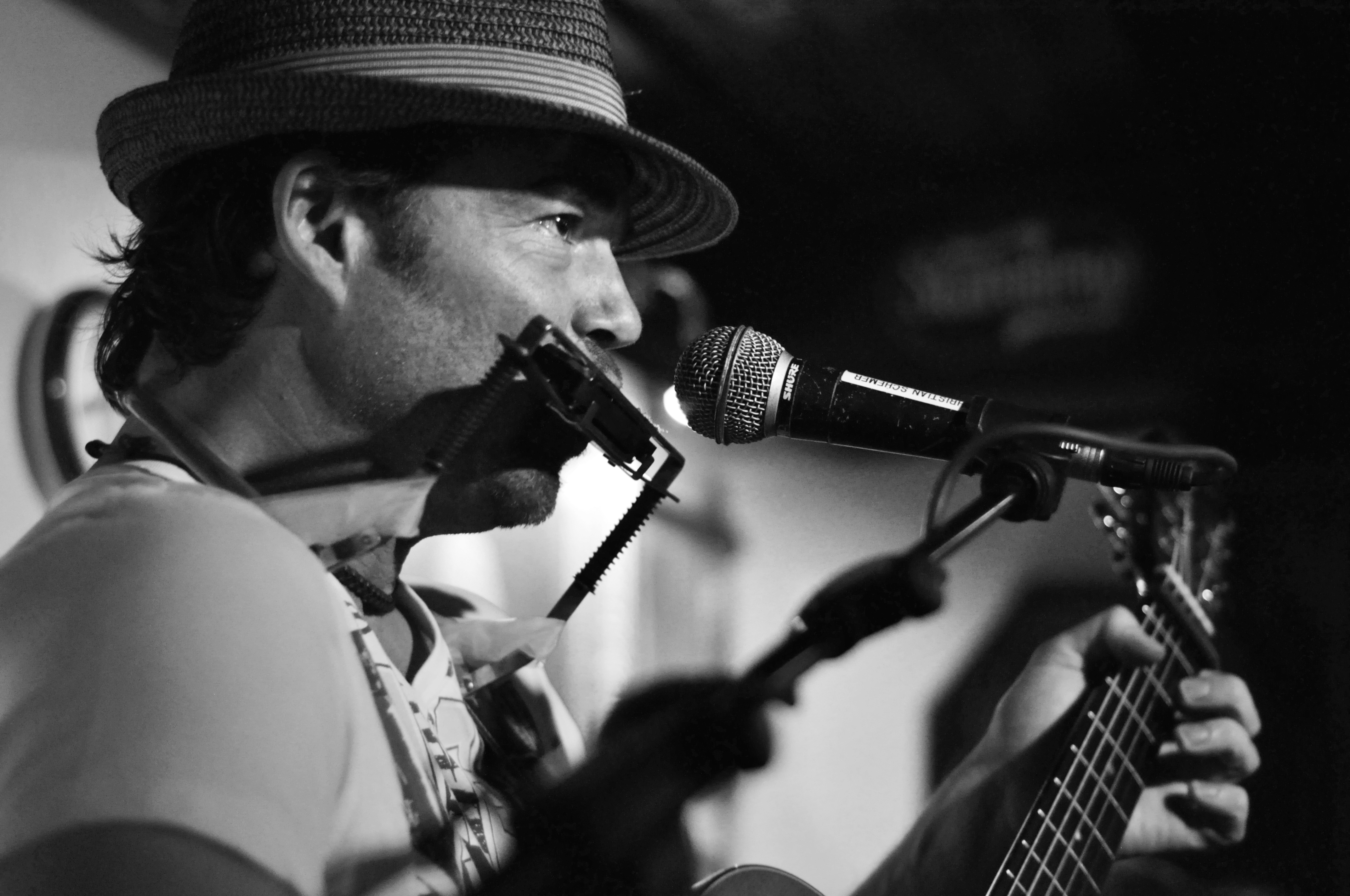 Chris Shermer Live in Concert